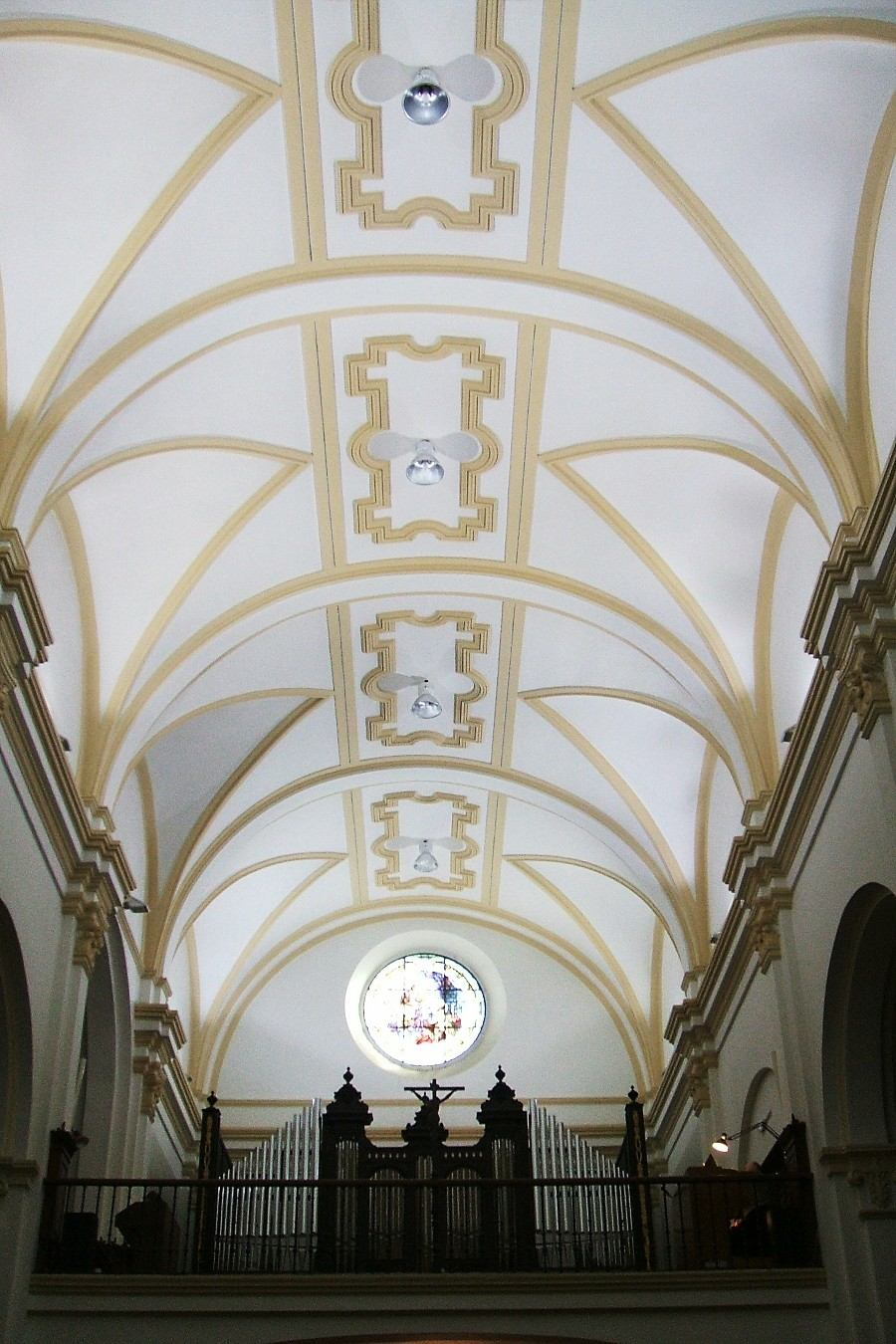 Iglesia del Carmen (PP Carmelitas Descalzos), en Vitoria-Gasteiz, País Vasco, España